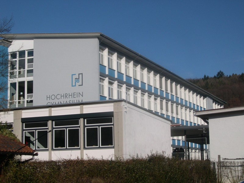 Gebaeude des Hochrhein-Gymnasiums